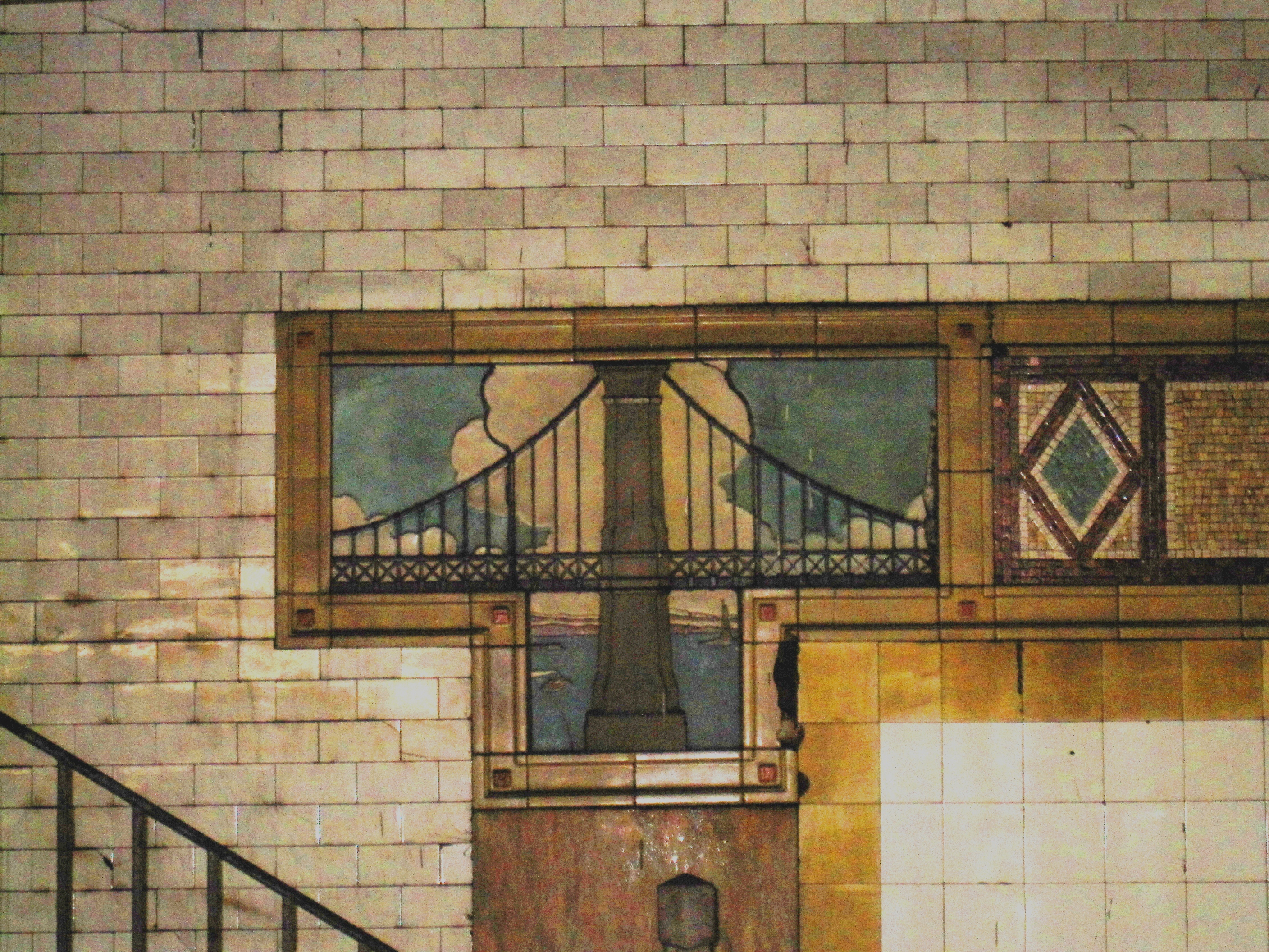 Chambers Street (BMT Nassau Street Line)